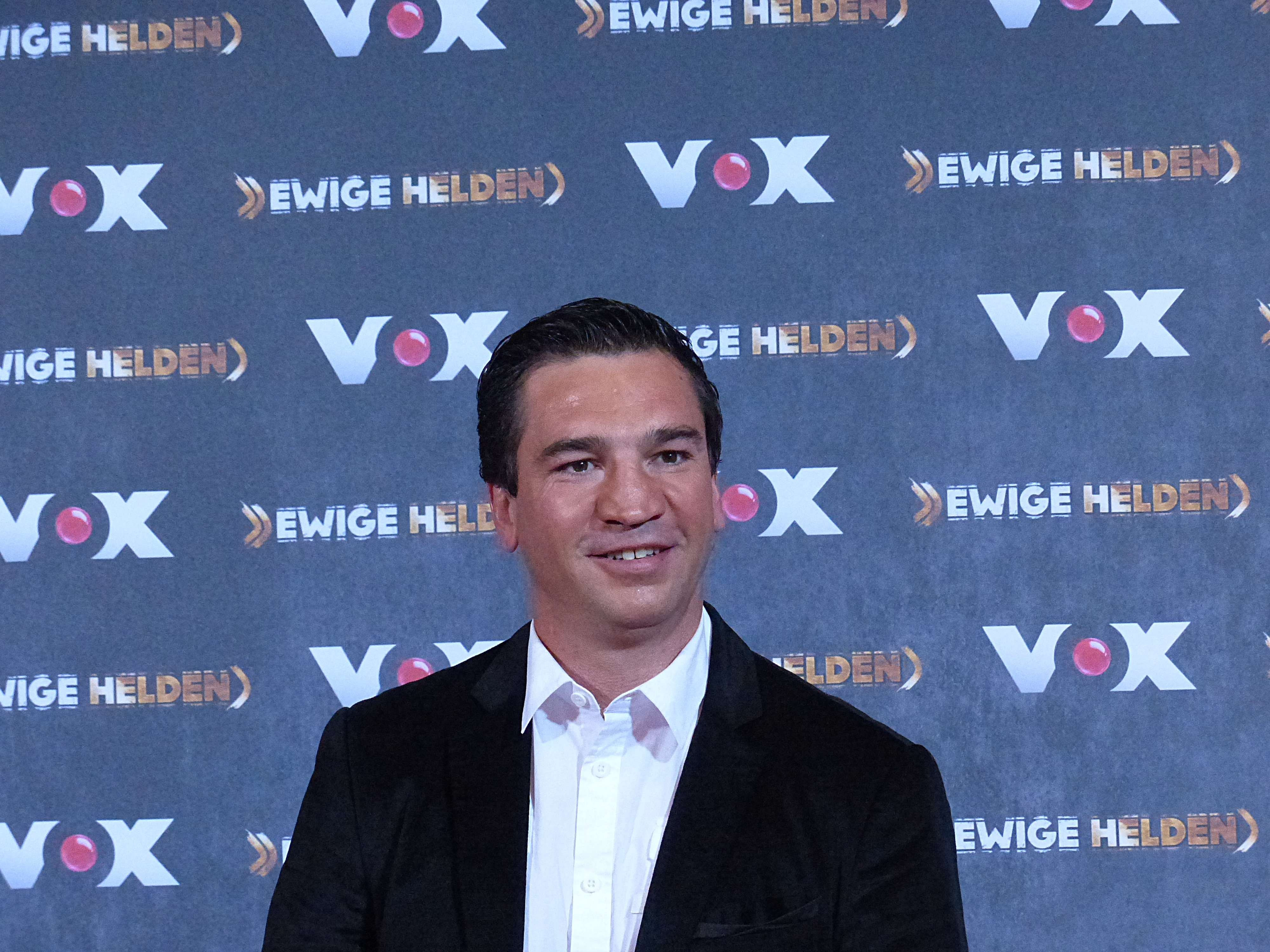 Markus Beyer beim VOX "Ewige Helden" Pressetermin, im Dezember 2015.